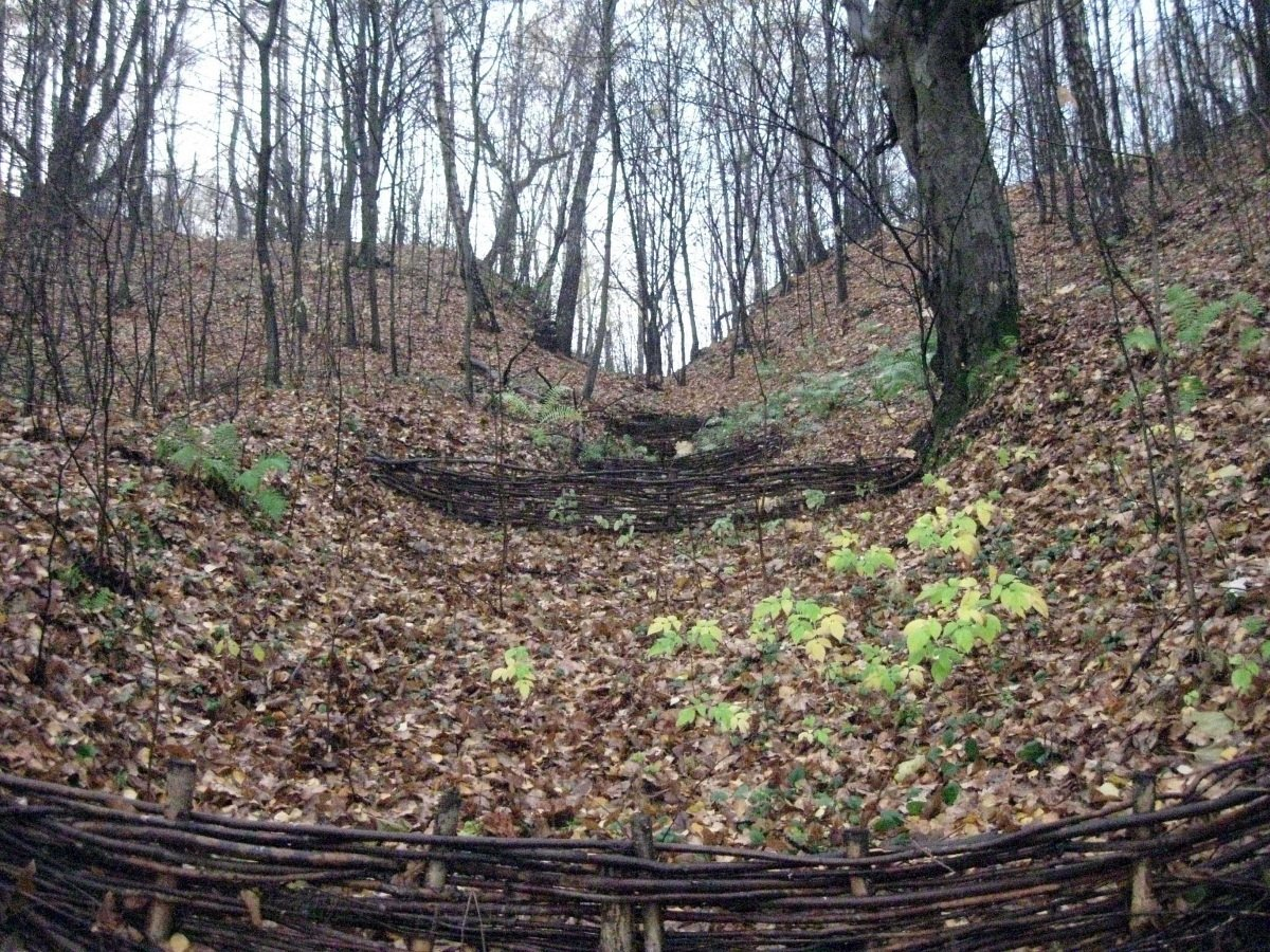 Мазыр. Заказнік Мазырскія яры